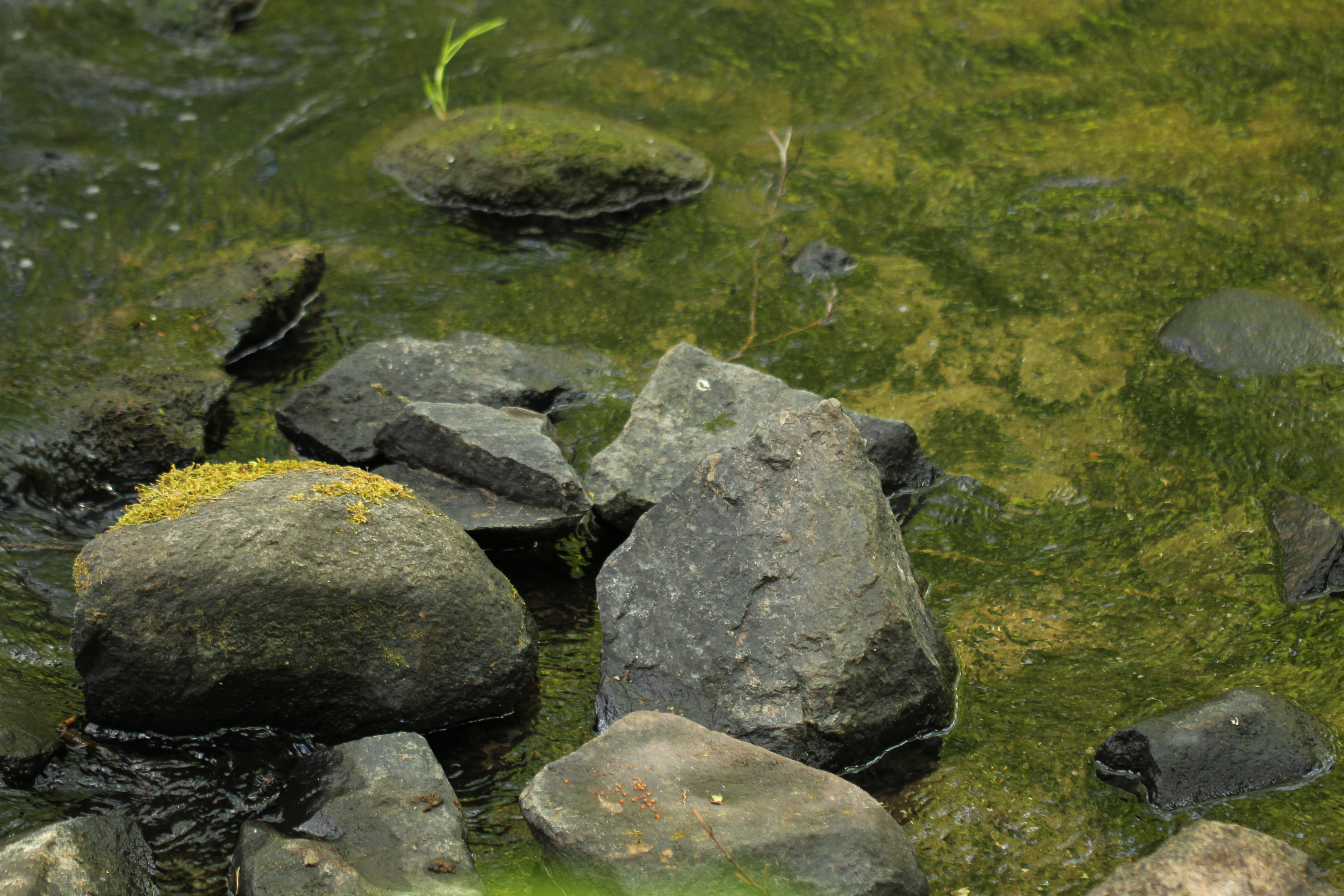 Ein Exemplar von Dianous coerulescens wurde hier gefunden und fotografiert.